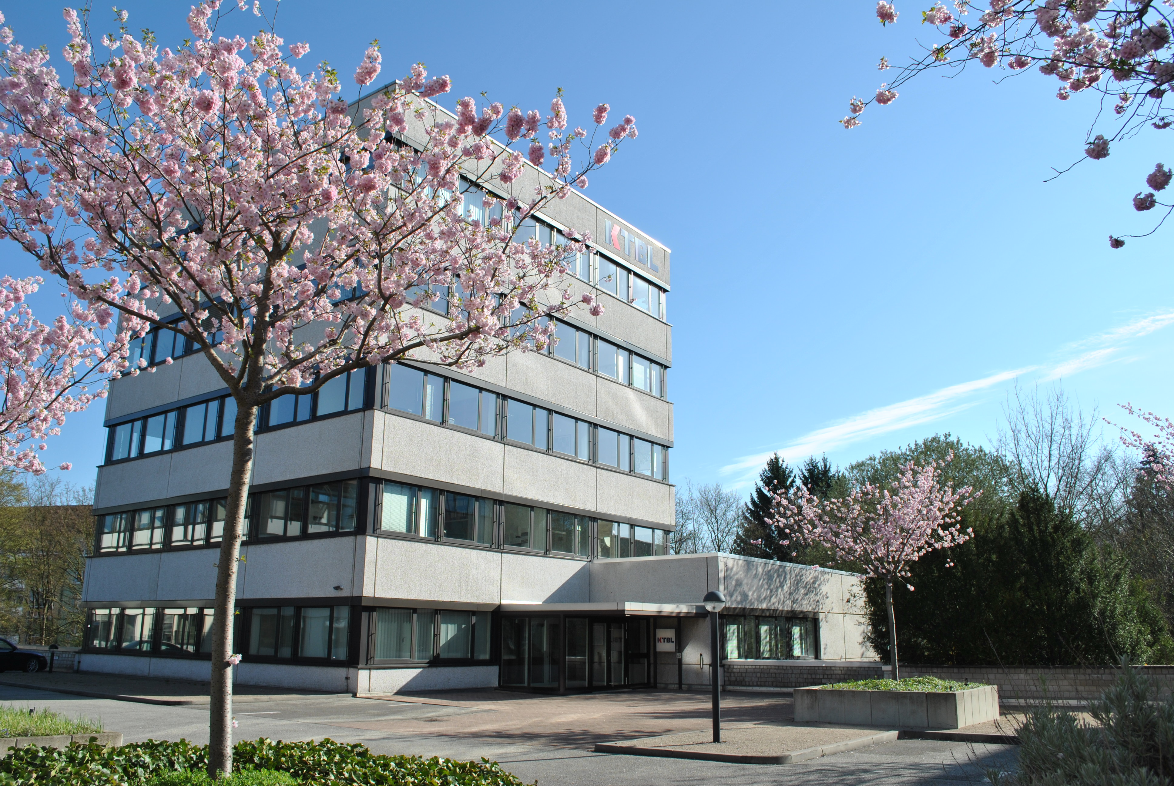 KTBL Geschäftsstelle Institutszentrum Darmstadt